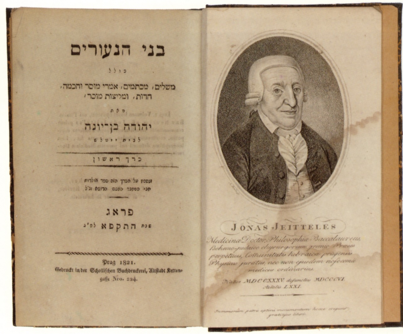 Jehuda ben Jona Jeitteles: Bne ha-neurim, Prag 1821. Eine Biografie des Arztes Jonas Jeitteles beigelegt (Prag, Jüdisches Museum)